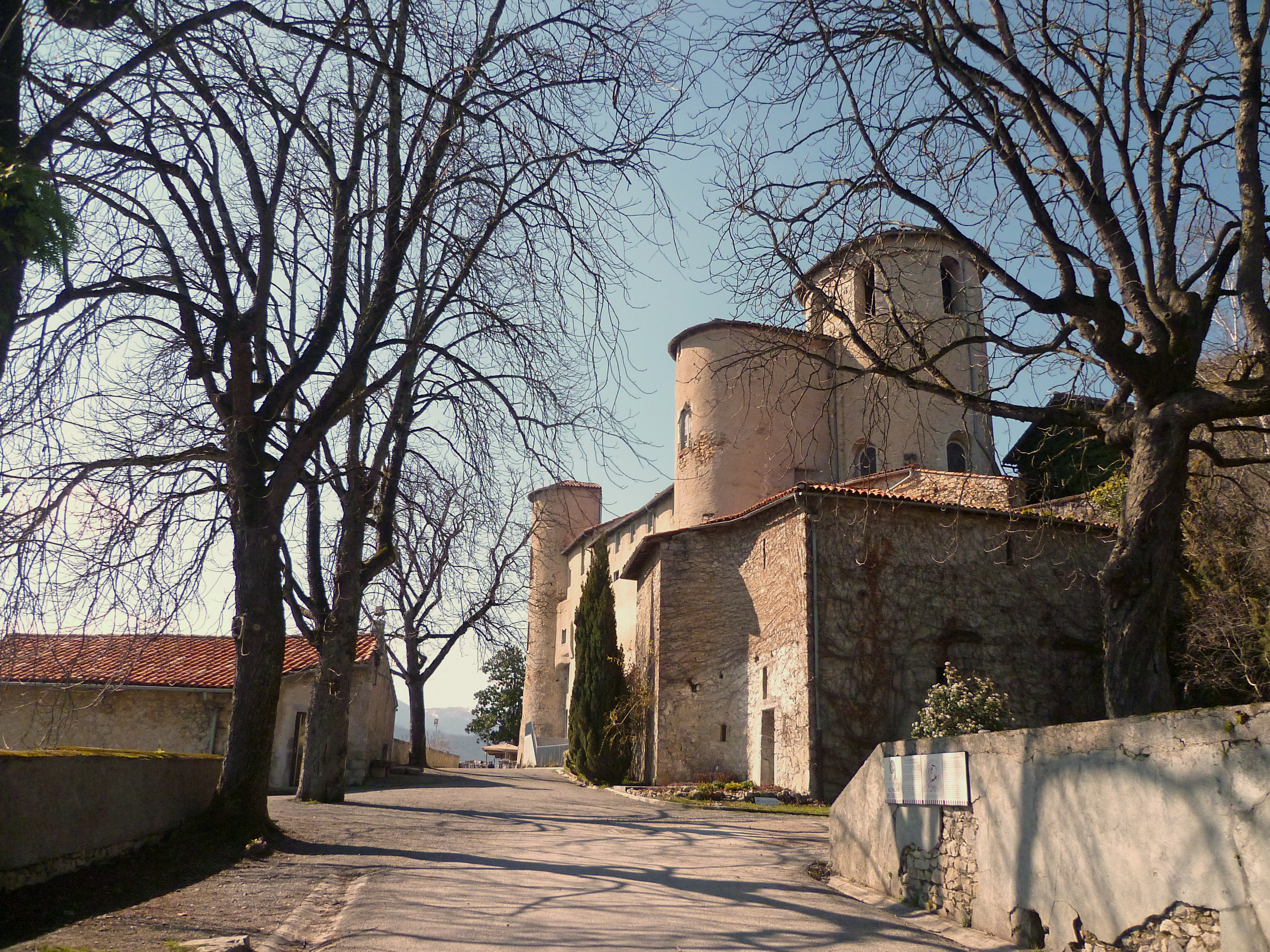 Saint-Lizier (Ariège, France) : Le Palais des Évêques.